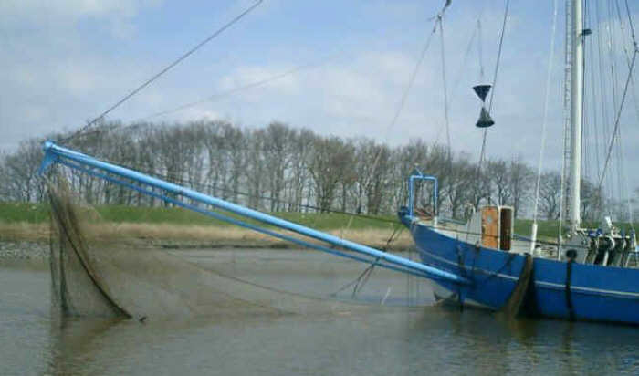 Krabbenfischer auf der Oste. Eig. Aufn., gemeinfrei, 2004